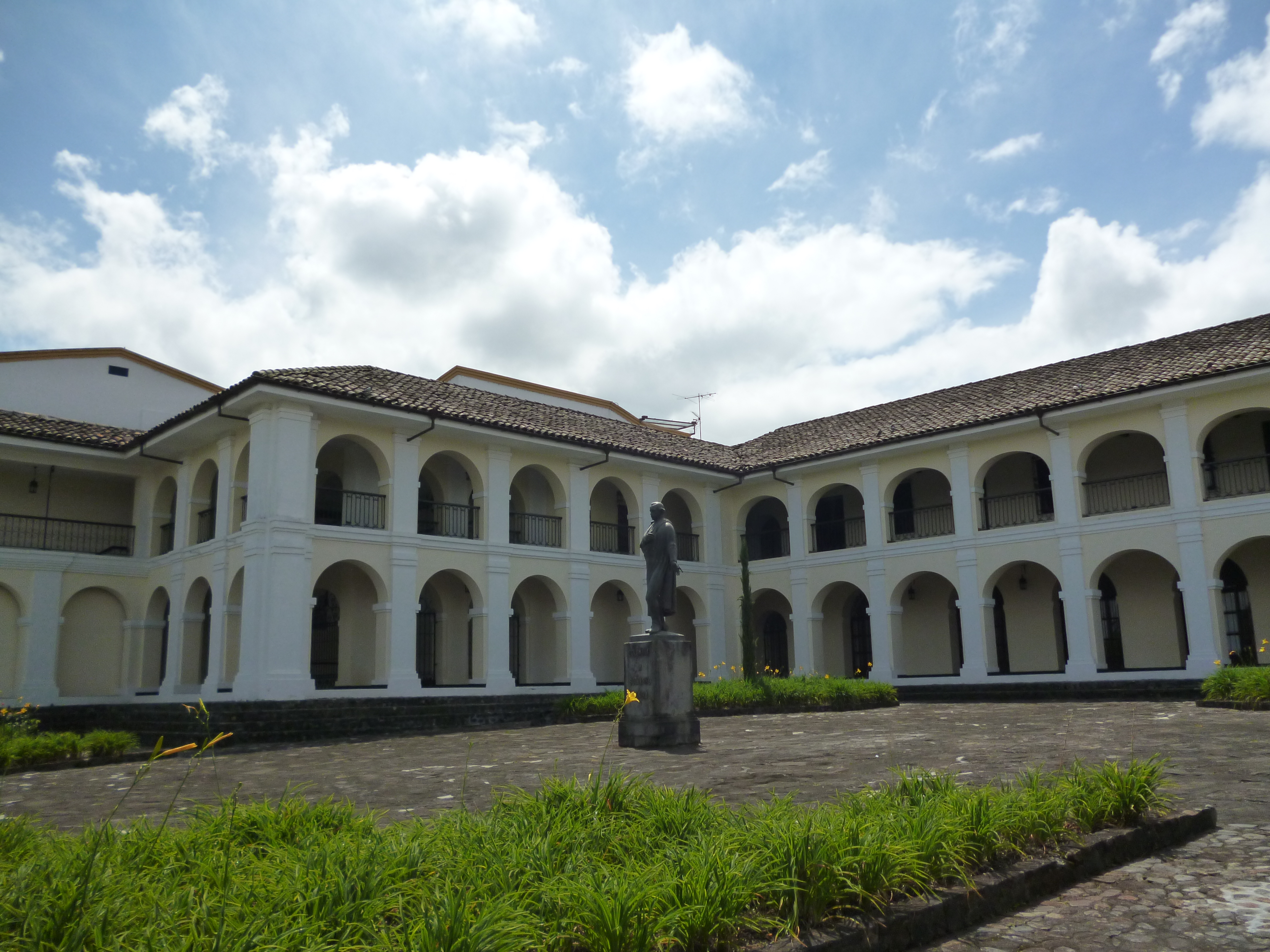 Vista trasera de la casa museo Guillermo Valencia, Popayán